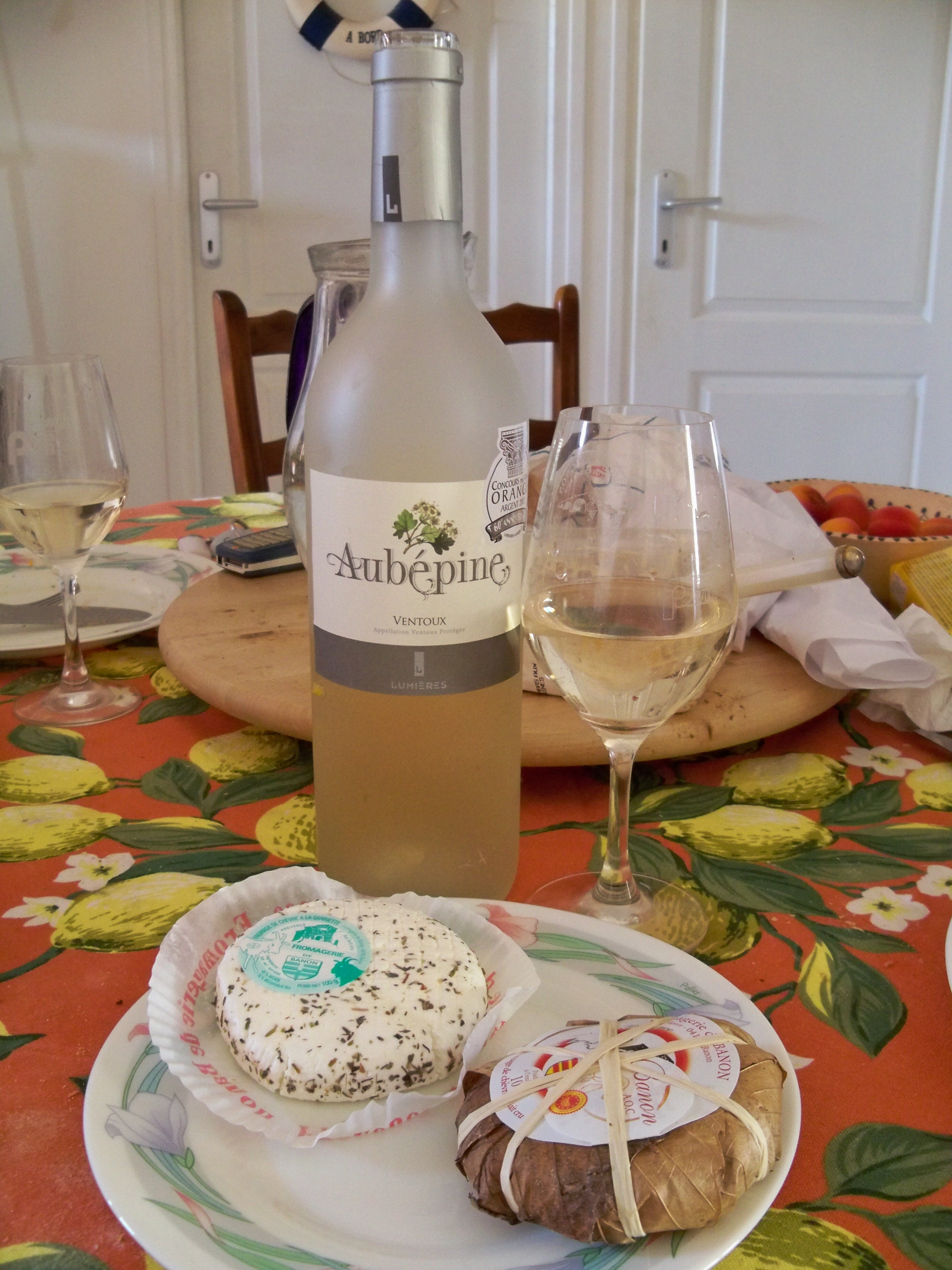 Fromage de chèvres : Banon et poivre d’âne, accompagnés d'AOC Ventoux